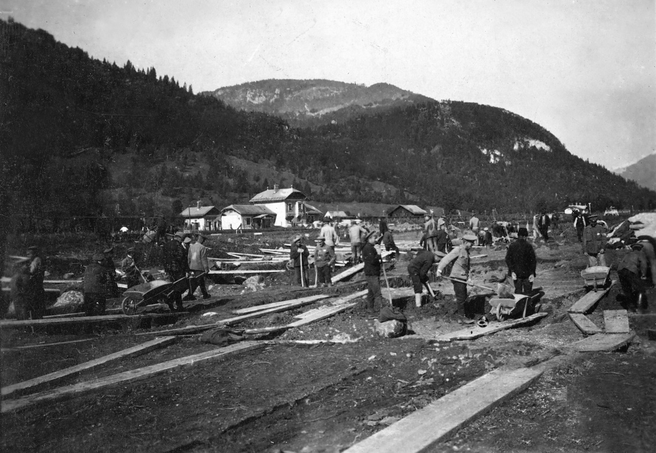 Vojni ujetniki pri zemeljskih delih za tovarno elektrod na Blejski Dobravi leta 1916.